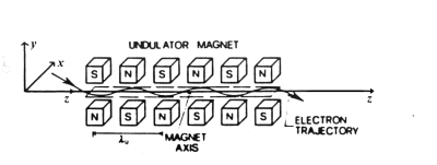 Sistema di coordinate per la descrizione dell'interazione di un fasci di elettroni all'interno di un ondulatore